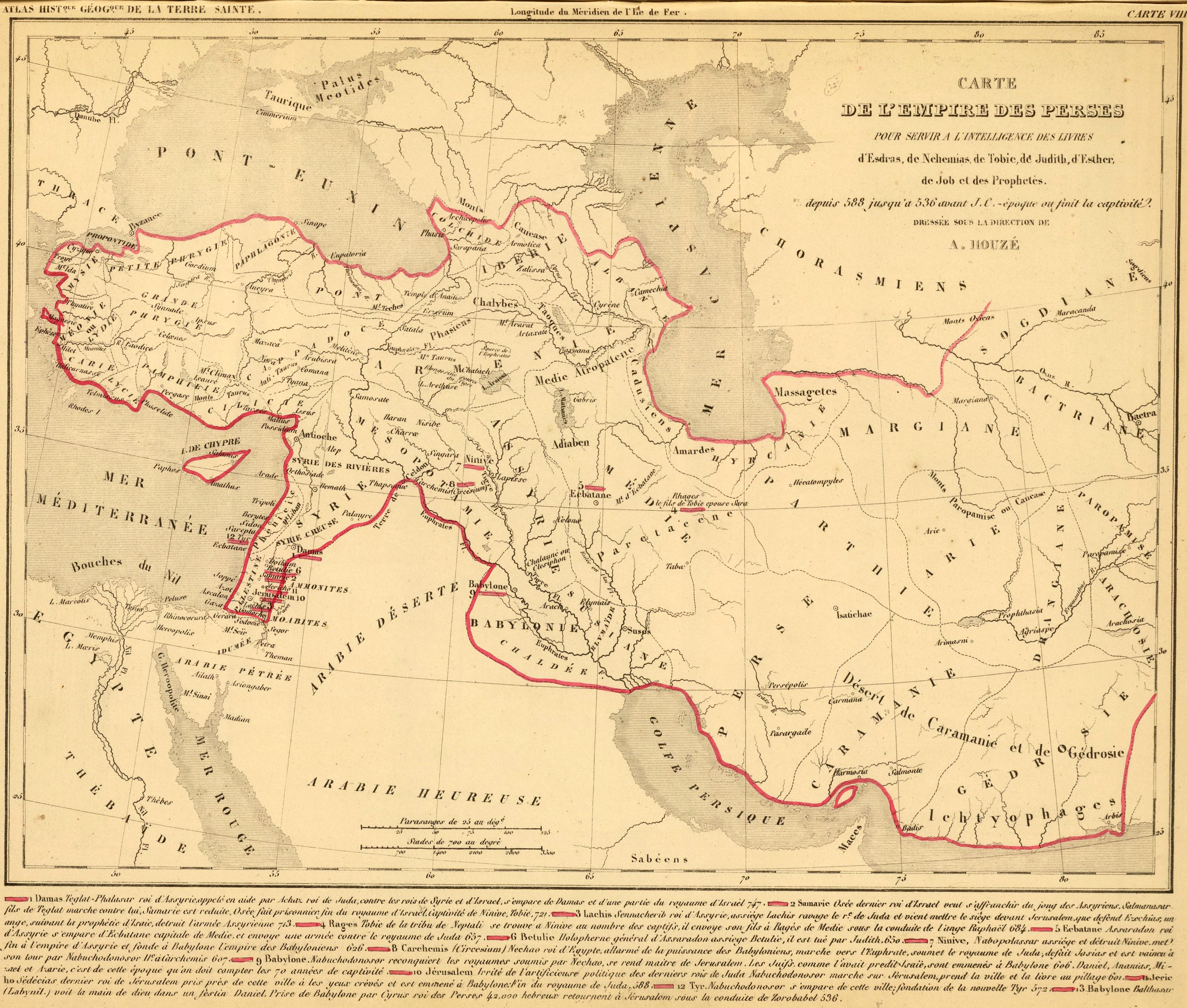 Carte de l'Empire des Perses. Pour servir a l'intelligence des livres d'Esdras, de Nehemias, de Tobie, de Judith, d'Esther, de Job et des Prophetes. Depuis 588 jusqu'a 536 avant J.C. epoque ou finit la captivite. Dressee sous la direction de A. Houze. (In upper margin:) Atlas histque. (et) geogque. de la Terre Sainte. Carte VIII. (Paris, Chez P. Dumenil, editeur, rue des Beaux-Arts, 10. 1844)